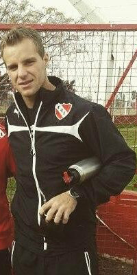 Diego "Ruso" Rodríguez, en un predio de Independiente, 2015.